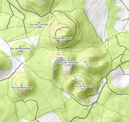 carte réalisée sur umap This map may be incomplete, and may contain errors. Don't rely solely on it for navigation.